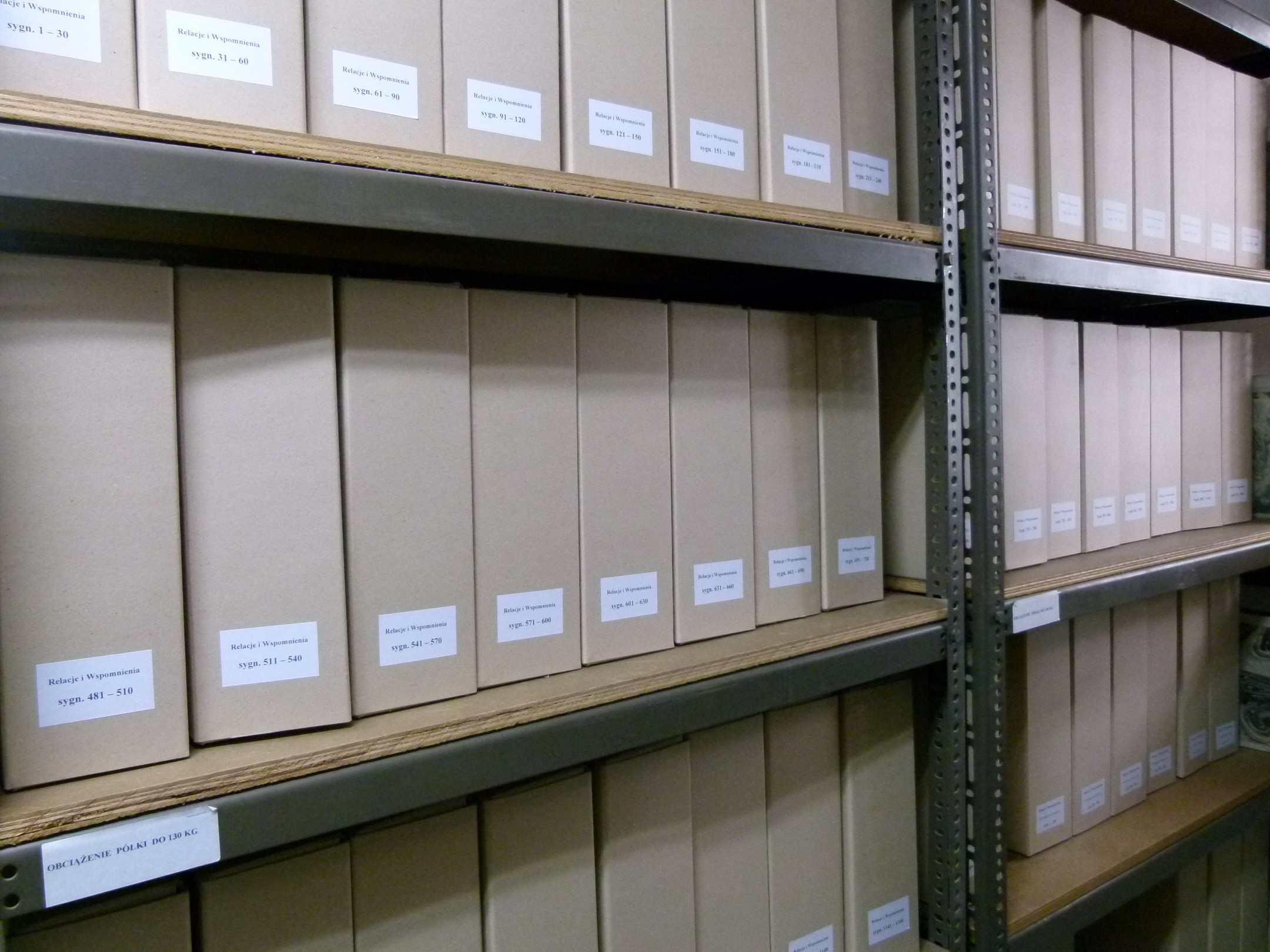 Zbiór „Relacje i Wspomnienia” w archiwum CMJW w Łambinowicach-Opolu